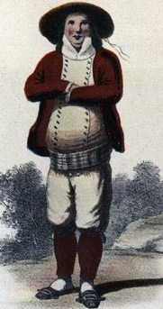 Homme du Faou vers 1850